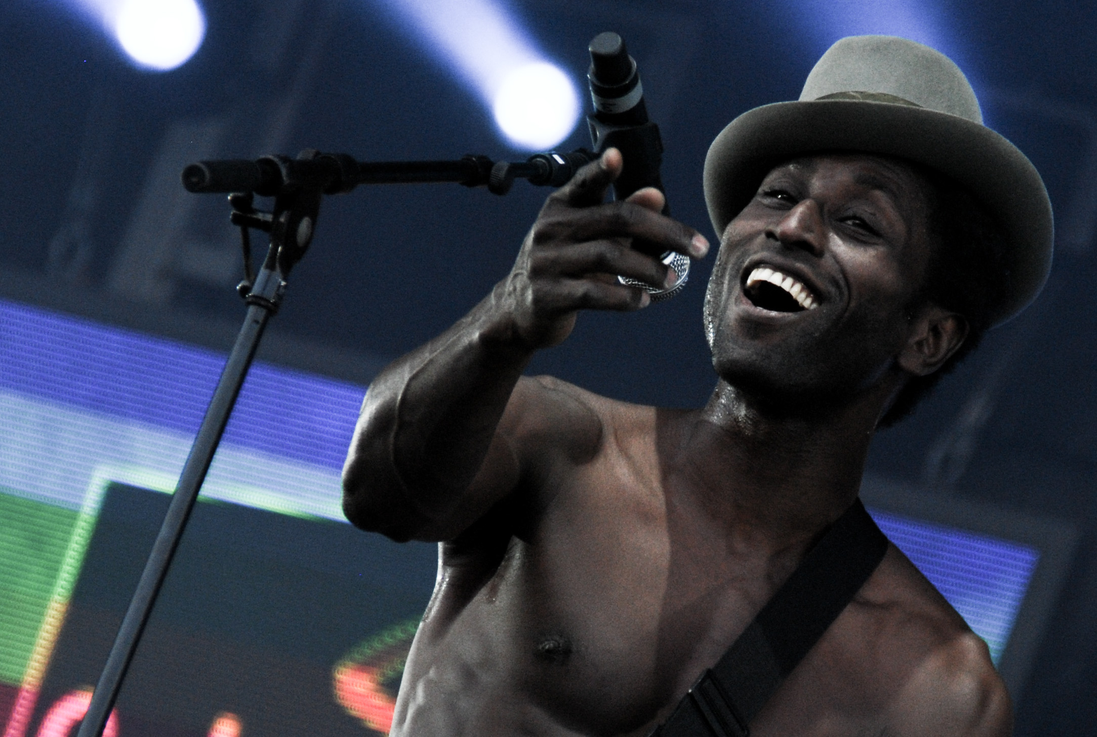 Keziah Jones at Solidays 2009.